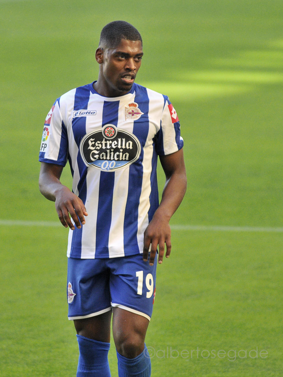 Ivan Cavaleiro playing for Deportivo la Coruna in April 2015.